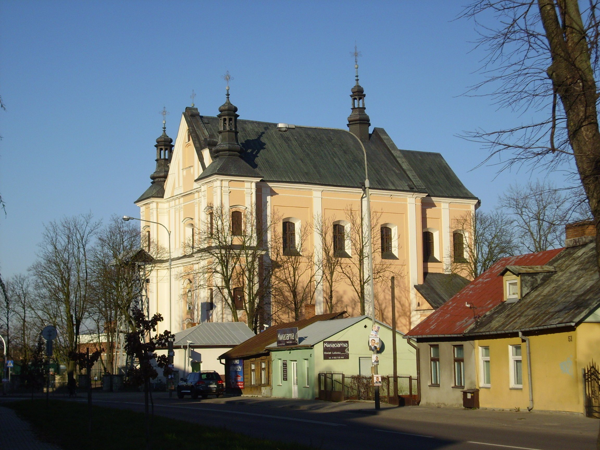 Łuków - kościół pw. Podwyższenia Krzyża Świętego w stylu barokowym z lat 1665-1770. (zabytek nr rejestr. Oa/165/56 i 69/A/383)